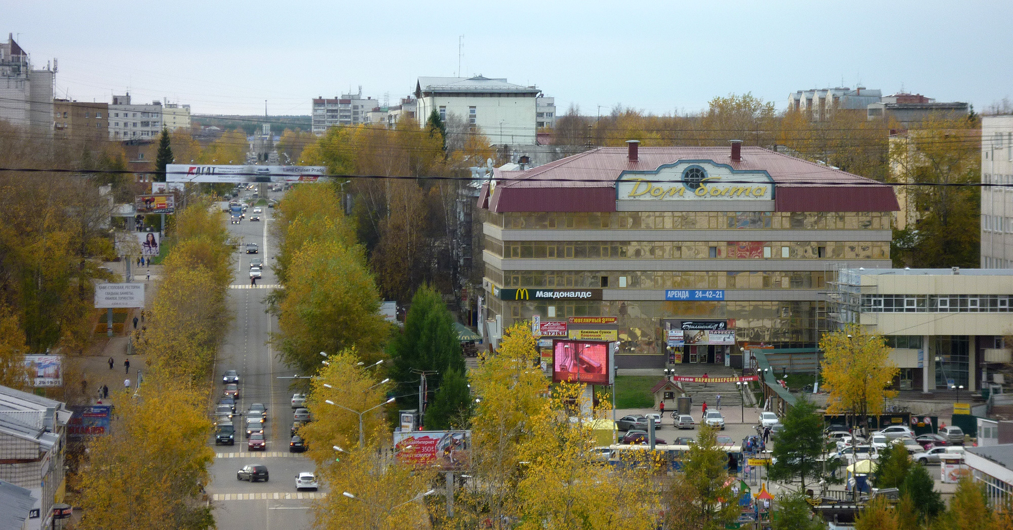 Сыктывкар